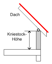 Kniestock, Drempel